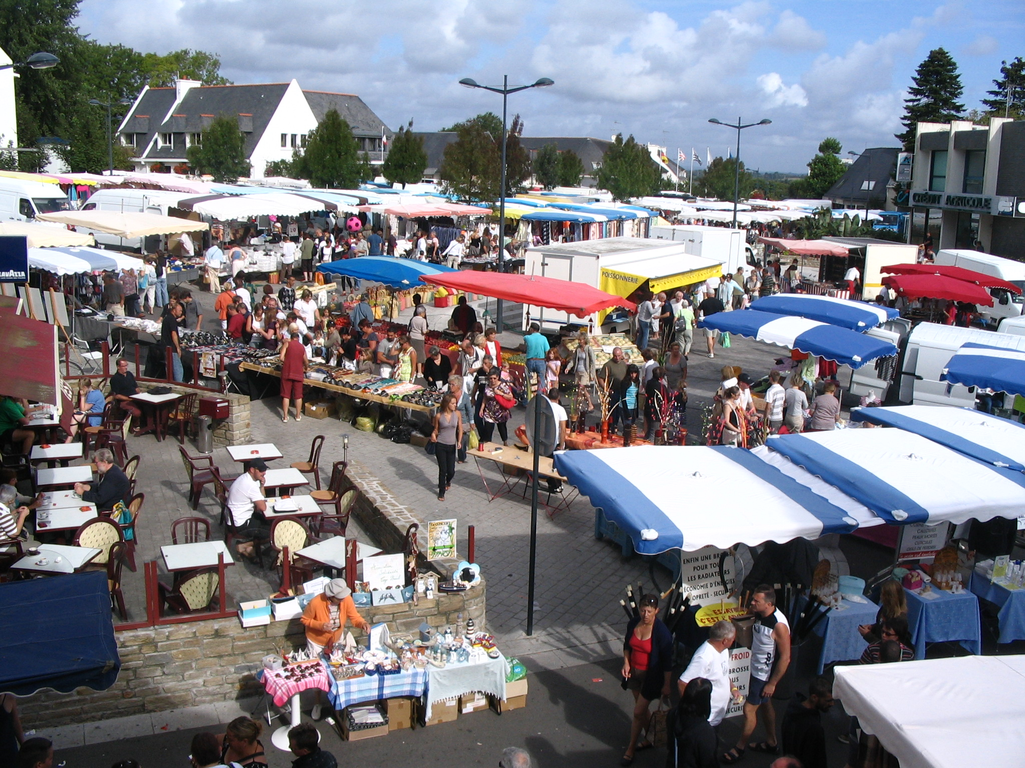 Fouesnant- Finistère- France - jour de marché